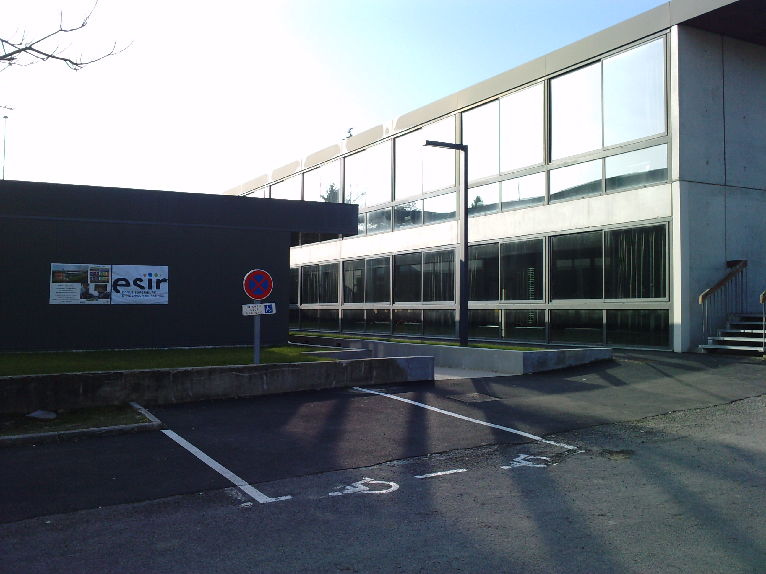 École Supérieure d'Ingénieur de Rennes sur le Campus de Beaulieu, bâtiments 41 et 41bis